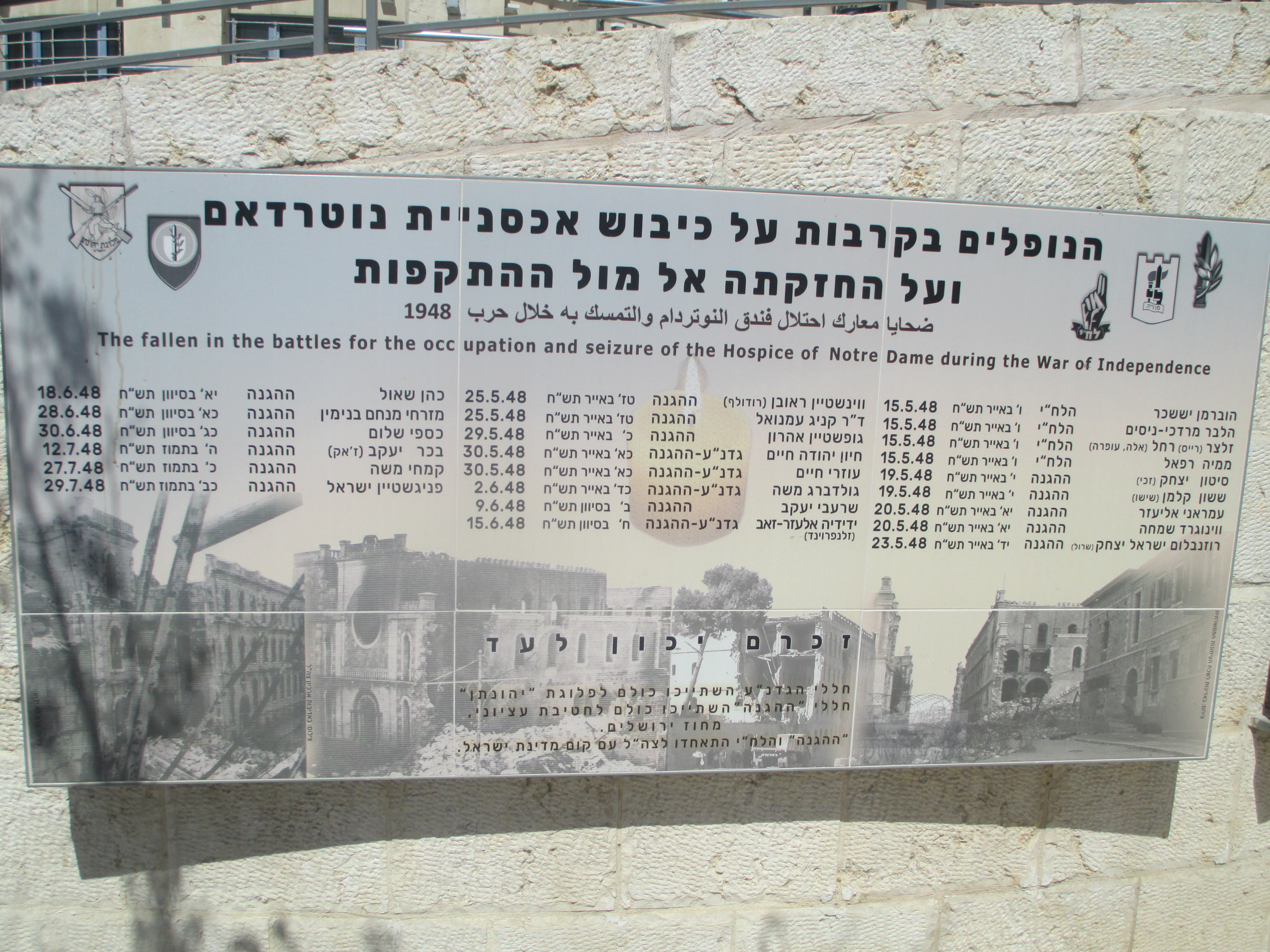 לוח הנצחה לנופלים בקרב נוטרדאם במלחמת העצמאות בירושלים